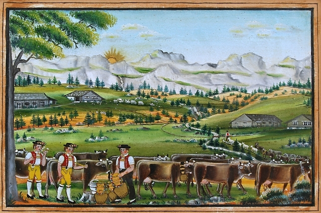 Ankunft auf der Alp, Appenzeller Volkskunde-Museum